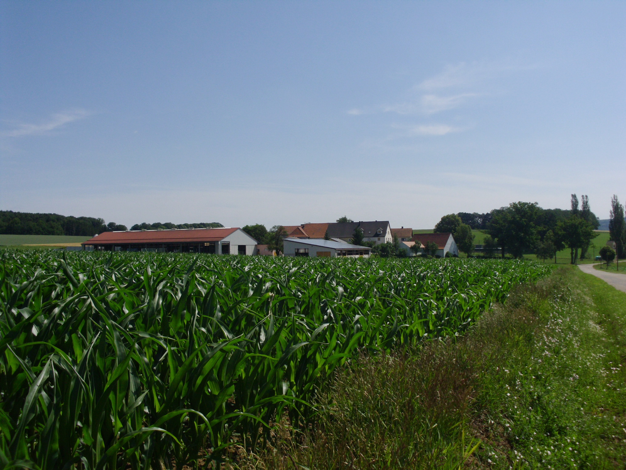 Metzenhof, Ortsteil von Treuchtlingen im Landkreis Weißenburg-Gunzenhausen